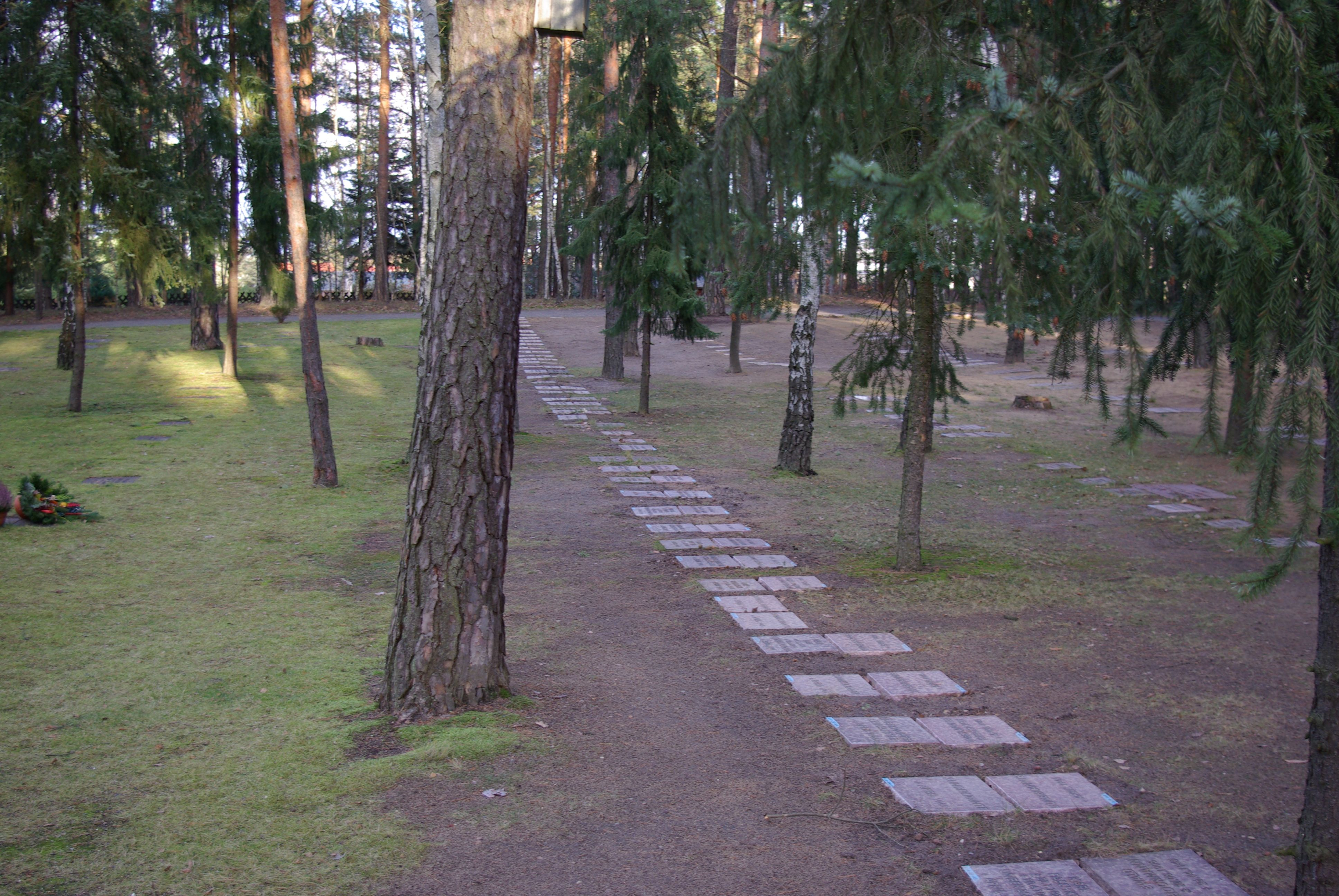 Waldfriedhof Halbe, Brandenburg, Deutschland ein Gräberfeld